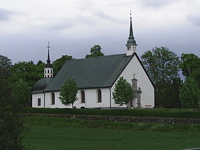 Norra Björke kyrka i Åsaka-Björke församling, Trollhättans kommun. Fotograf: Tubaist